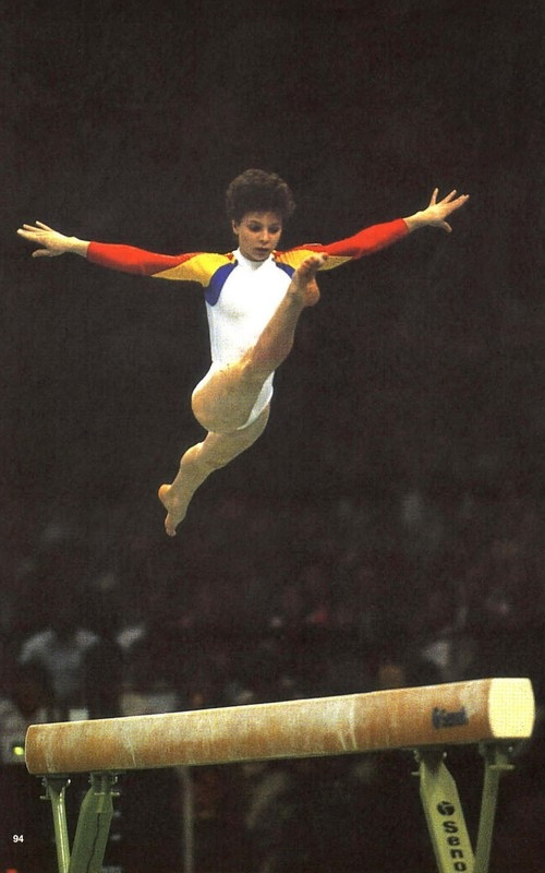 Daniela Silivaș, 1988 Olympics